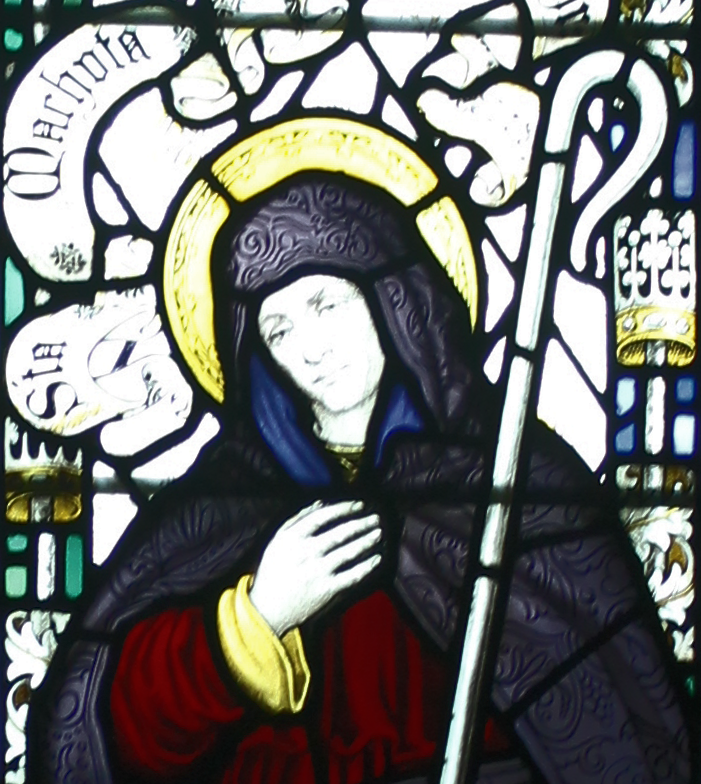 Santes Maches - ar ffenest liw yn eglwys Llandogo, Sir Fynwy. O'r ddelwedd: File:Llandogo Monmouthshire Cymru Wales 14.JPG